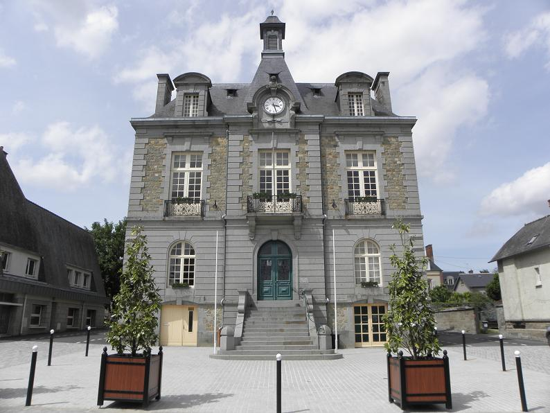 Mairie de Combourg (35).